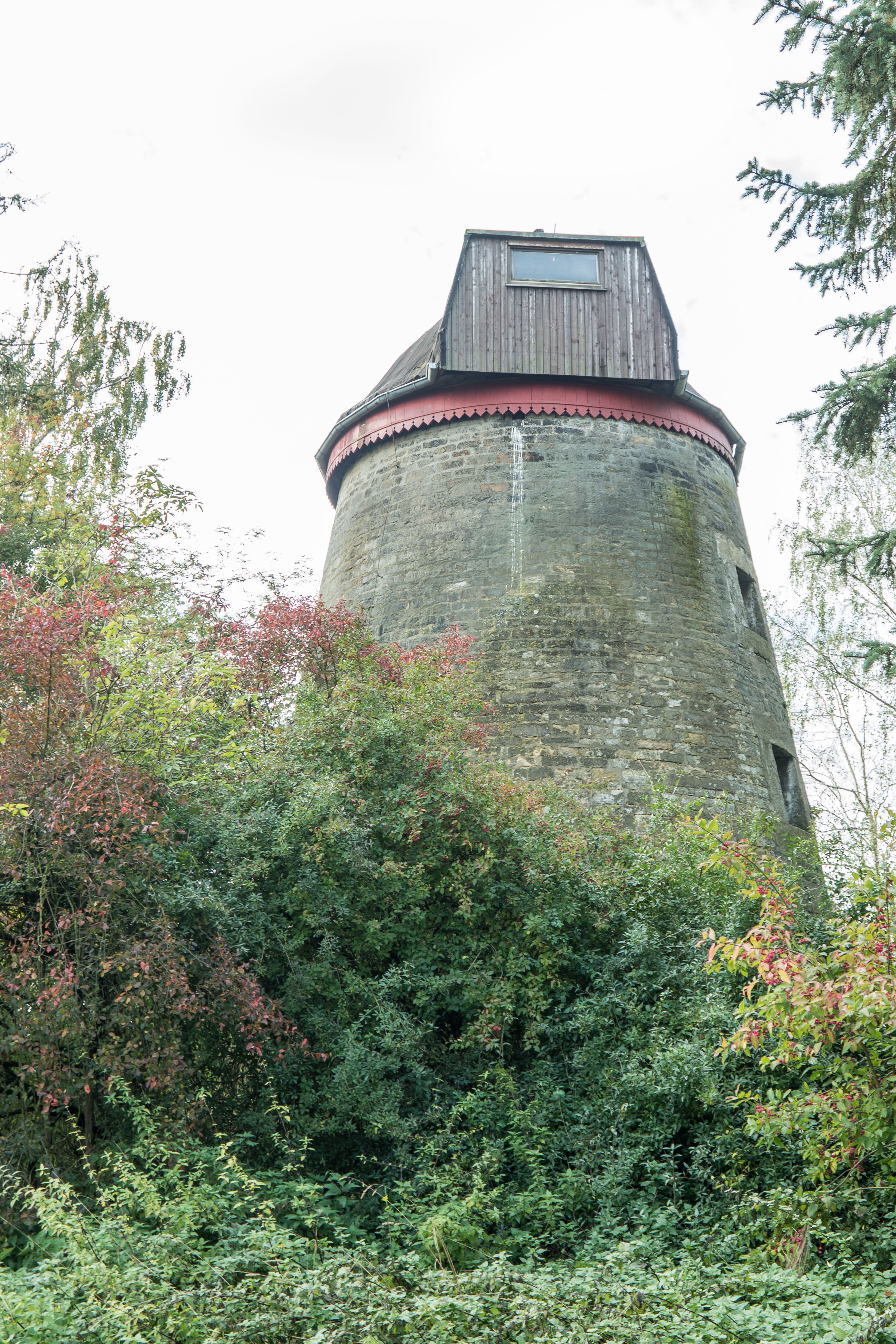 Windmühle Groß Sisbeck